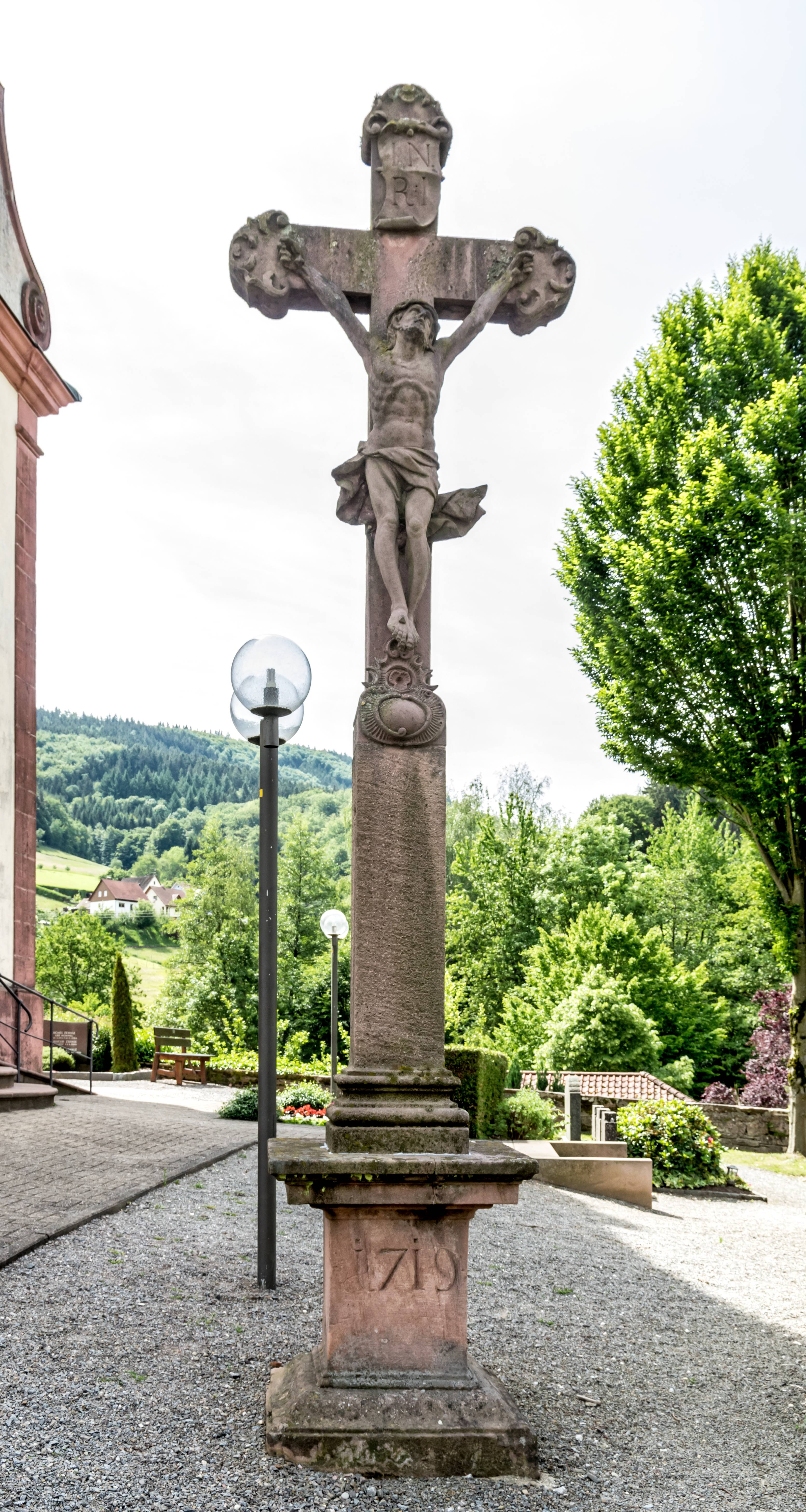 Bilder von der Kirche St. Romanus in Schweighausen Das Kreuz vor dem Haupteingang aus dem Jahre 1719